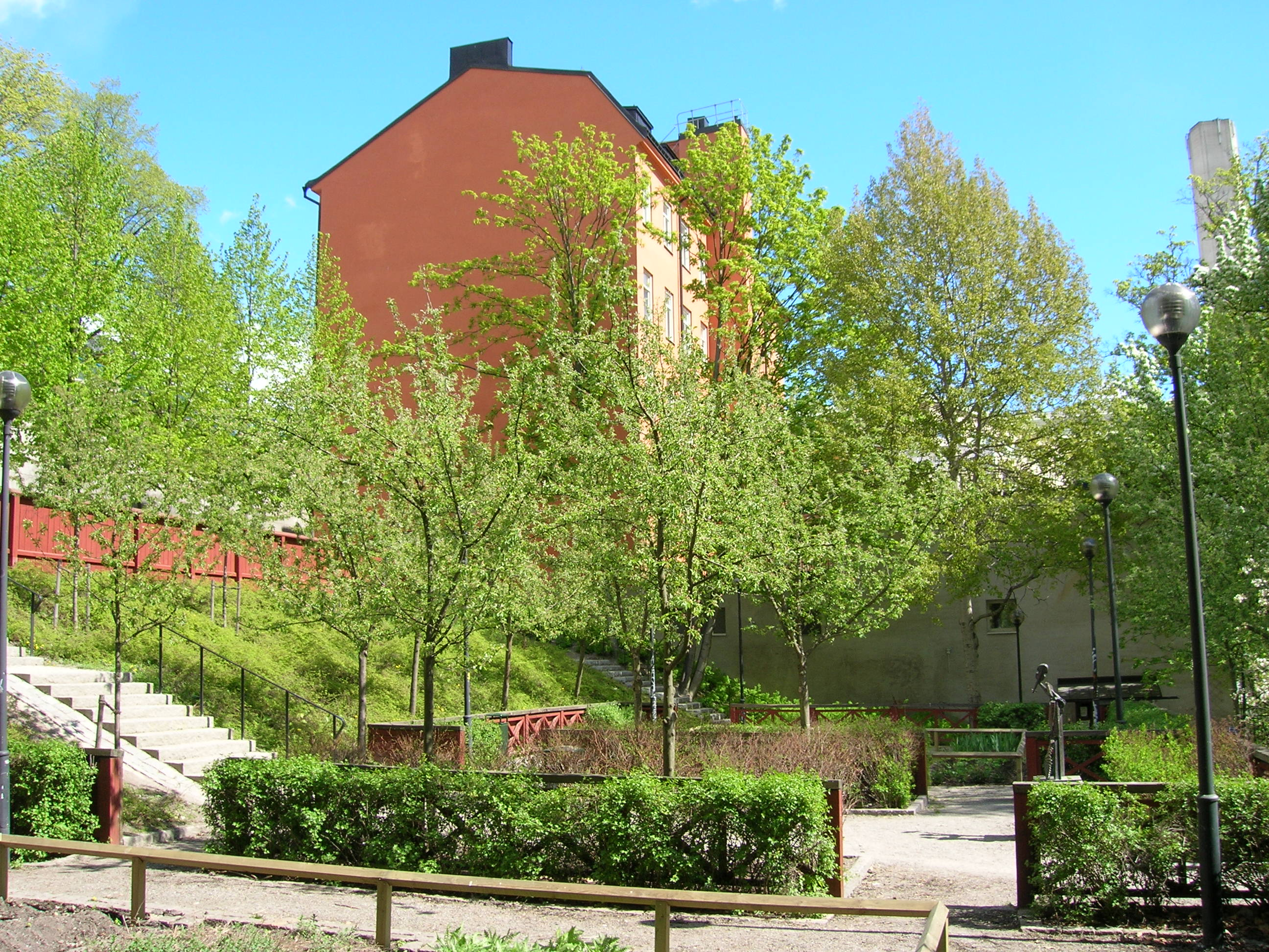 Johan Helmich Romans park, Södermalm, Stockholm, 16 maj 2006